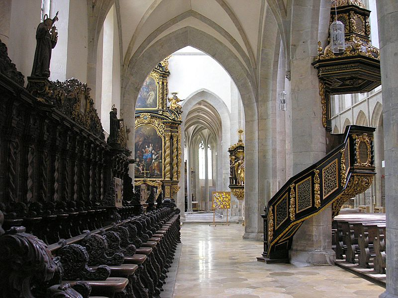 Klosterkirche Kaisheim (Landkreis Donau-Ries, Bayern). Südliches Seitenschiff nach Osten. Eigene Aufnahme, Juli 2006 / Abbey church Kaisheim near Donauwoerth, Bavaria, Germany. South aisle of the nave looking east. Own photo, July 2006